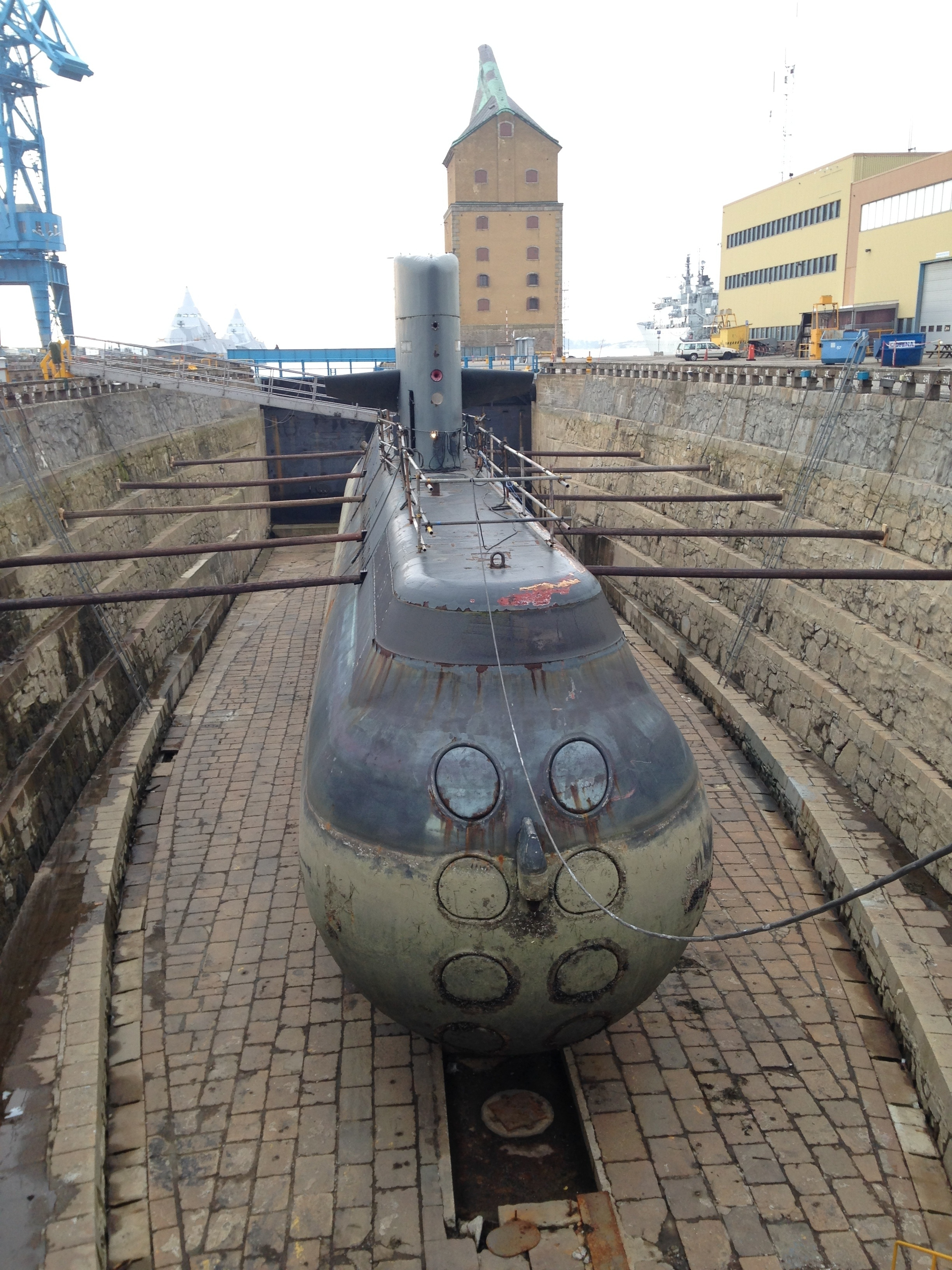 Den svenska ubåten HMS Najad (Nad) i torrdocka, Karlskrona.